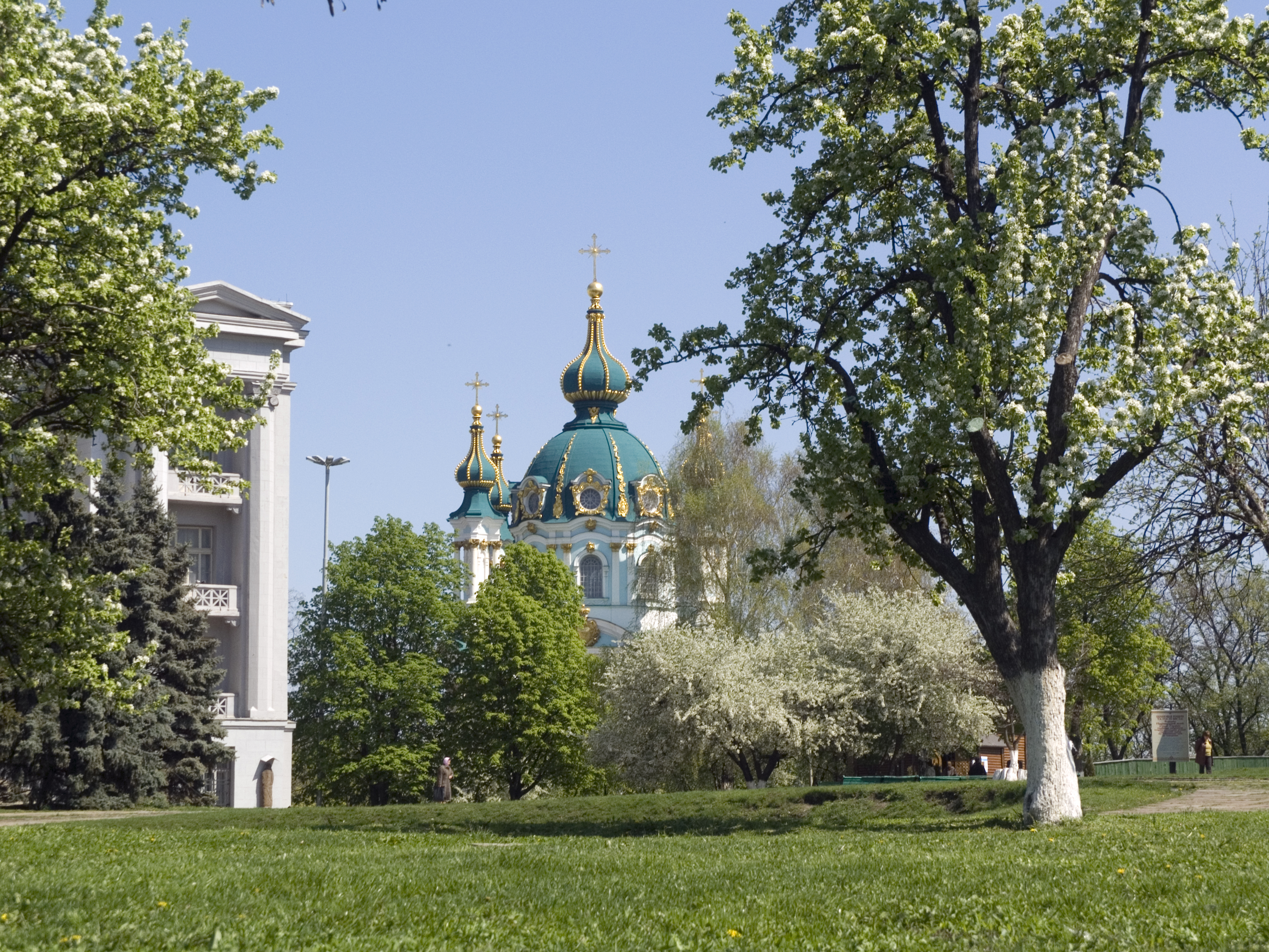 Україна, Київ - Церква Андріївська